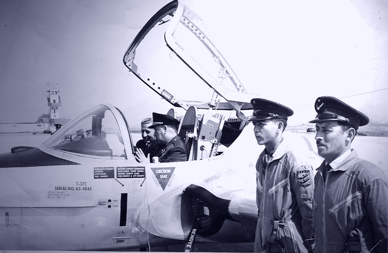 Base Aérea El Bosque, Santiago, Chile. Fotógrafo desconocido. Fotografía perteneciente al archivo personal del SOM John Ramirez